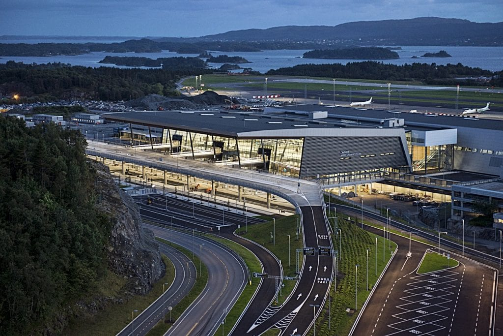 Nye Terminalen I Bergen